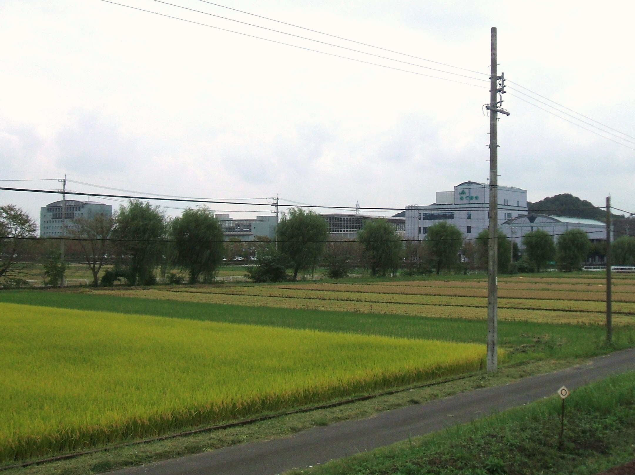 駅から見た関市役所。